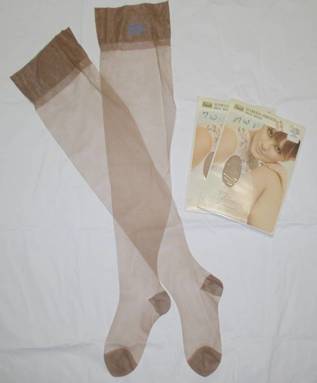 Nylon stockings